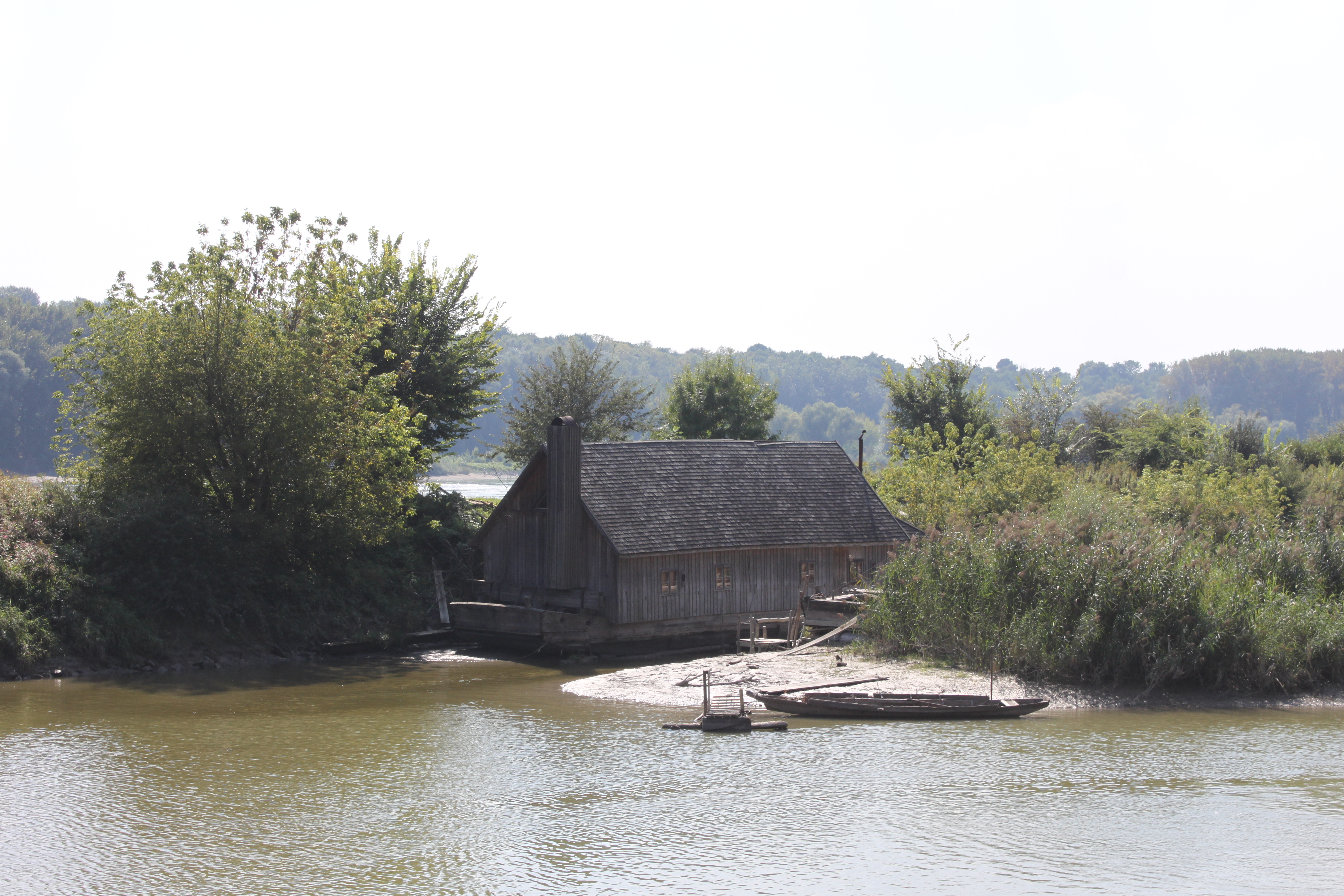 Schiffmühle Orth an der Donau